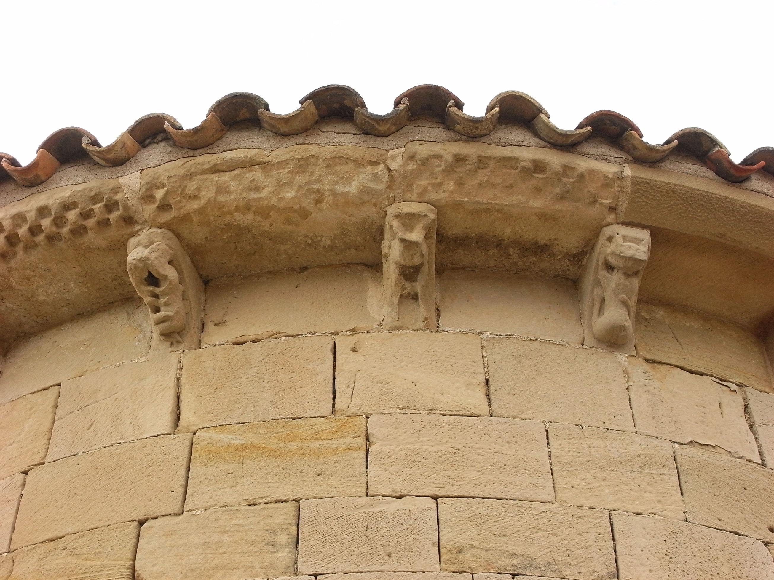 Detalle de los canecillos del ábside en la ermita de Santa María de La Piscina. La Rioja (España)